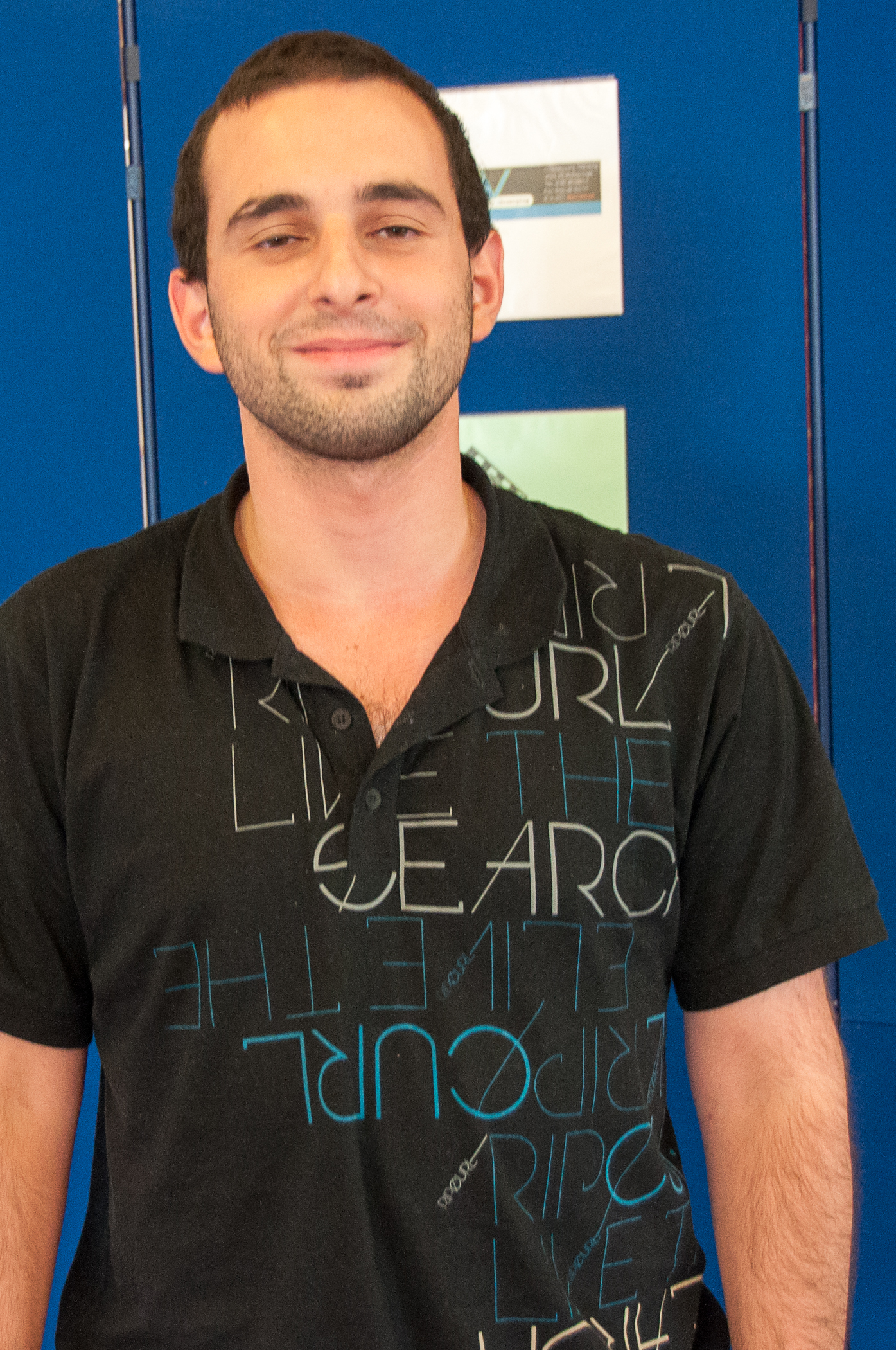 IM Gil Popilski